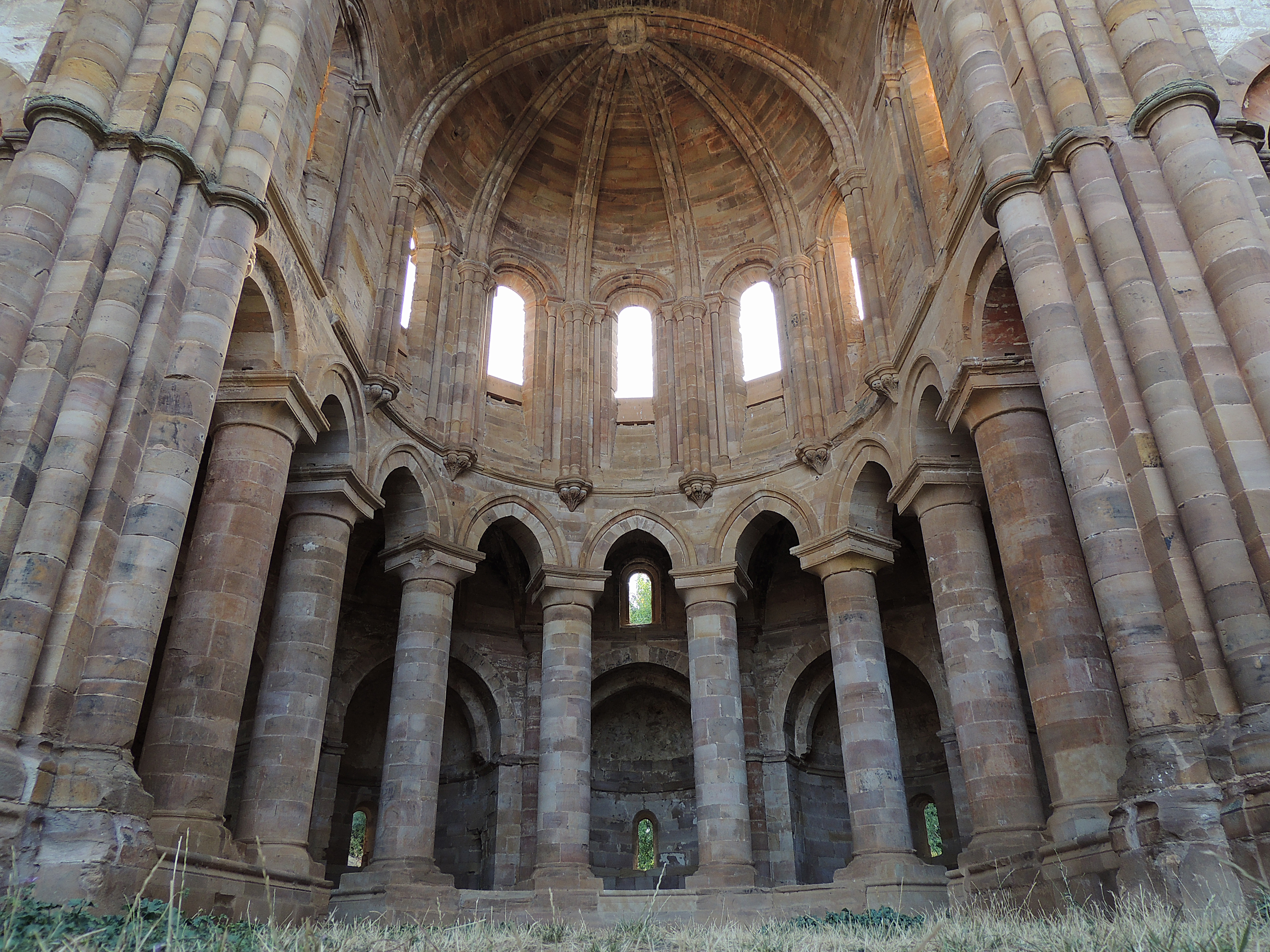 Capilla mayor de la iglesia del monasterio de Santa María de Moreruela